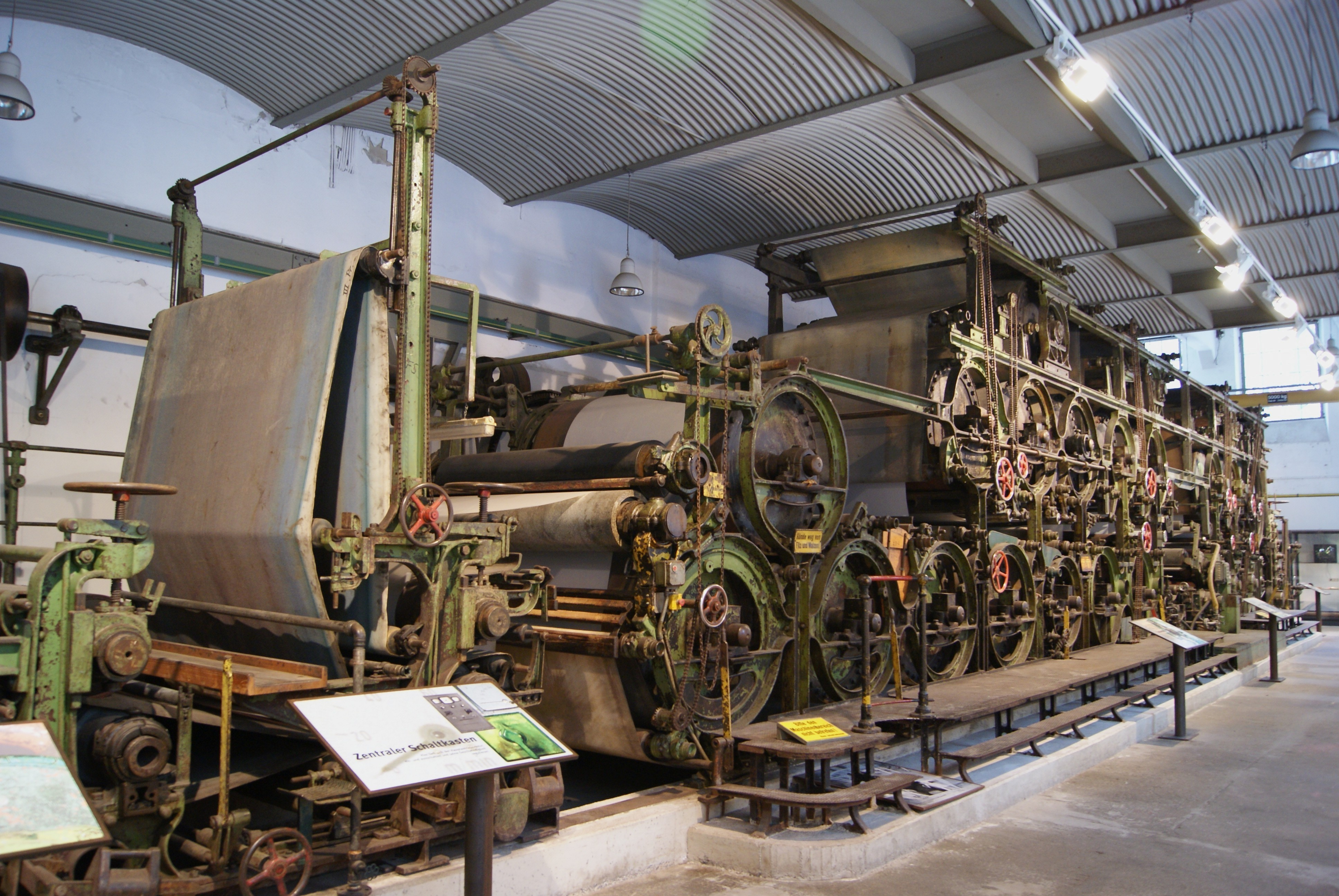 Die Zanders-Papiermaschine 4 (PM 4), in Betrieb 1889 - 1991, ausgestellt im Maschinenraum Neue Dombach des LVR-Industriemuseums Berg. Gladbach (Papiermuseum Alte Dombach)